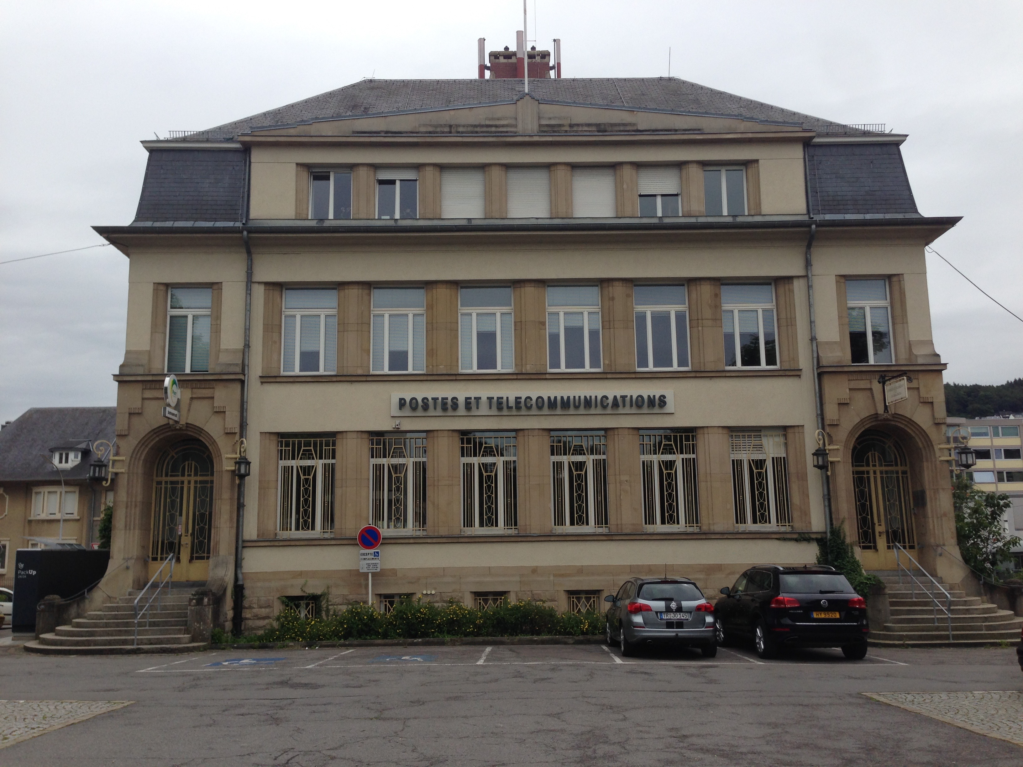 Grevenmacher in Luxemburg